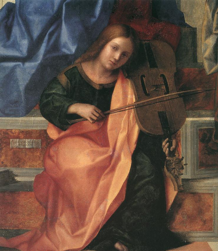 Sacra Conversazione von Giovanni Bellini, San Zaccaria Venedig.